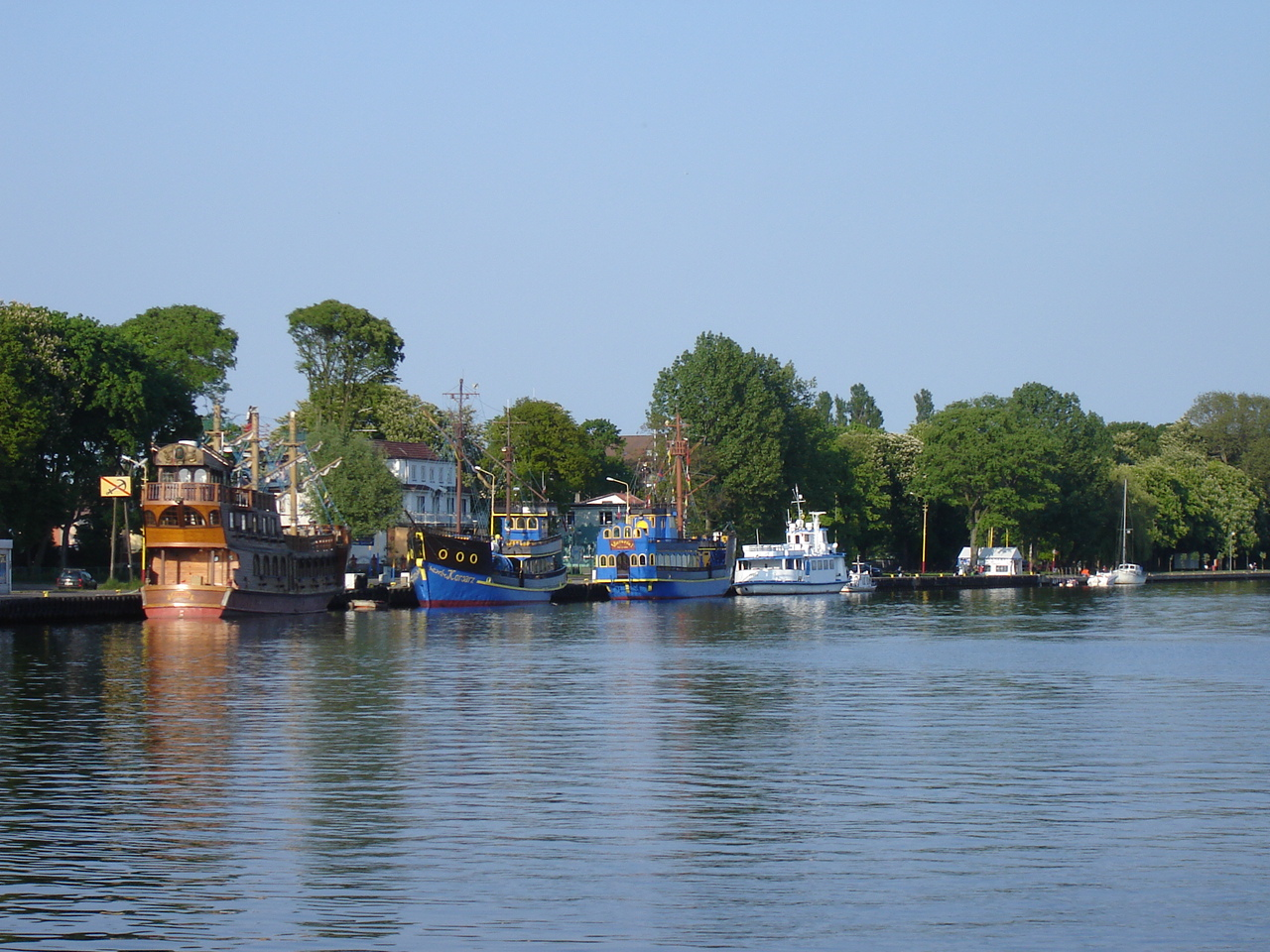 Port w Dziwnowie widziany od strony wody.